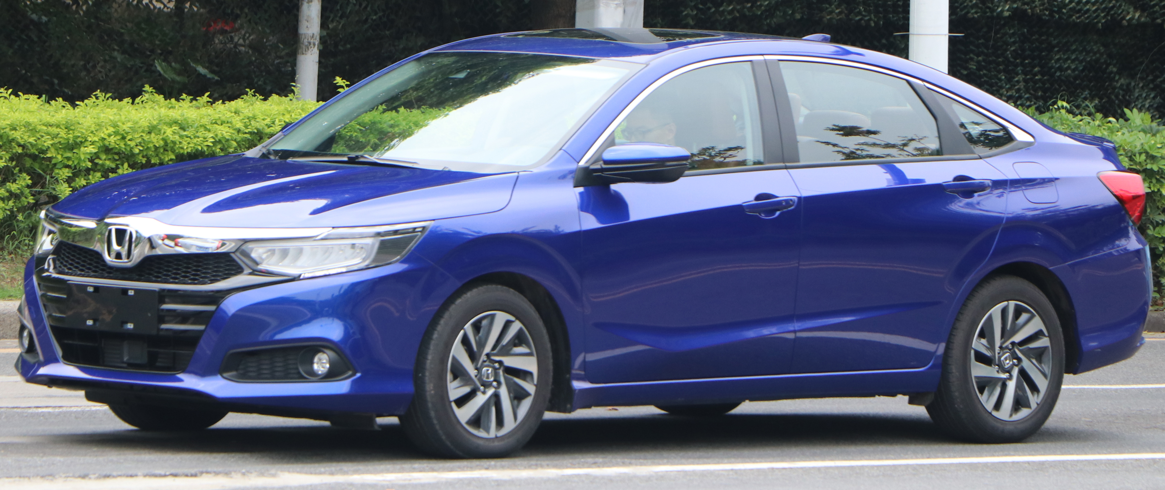 广汽本田凌派